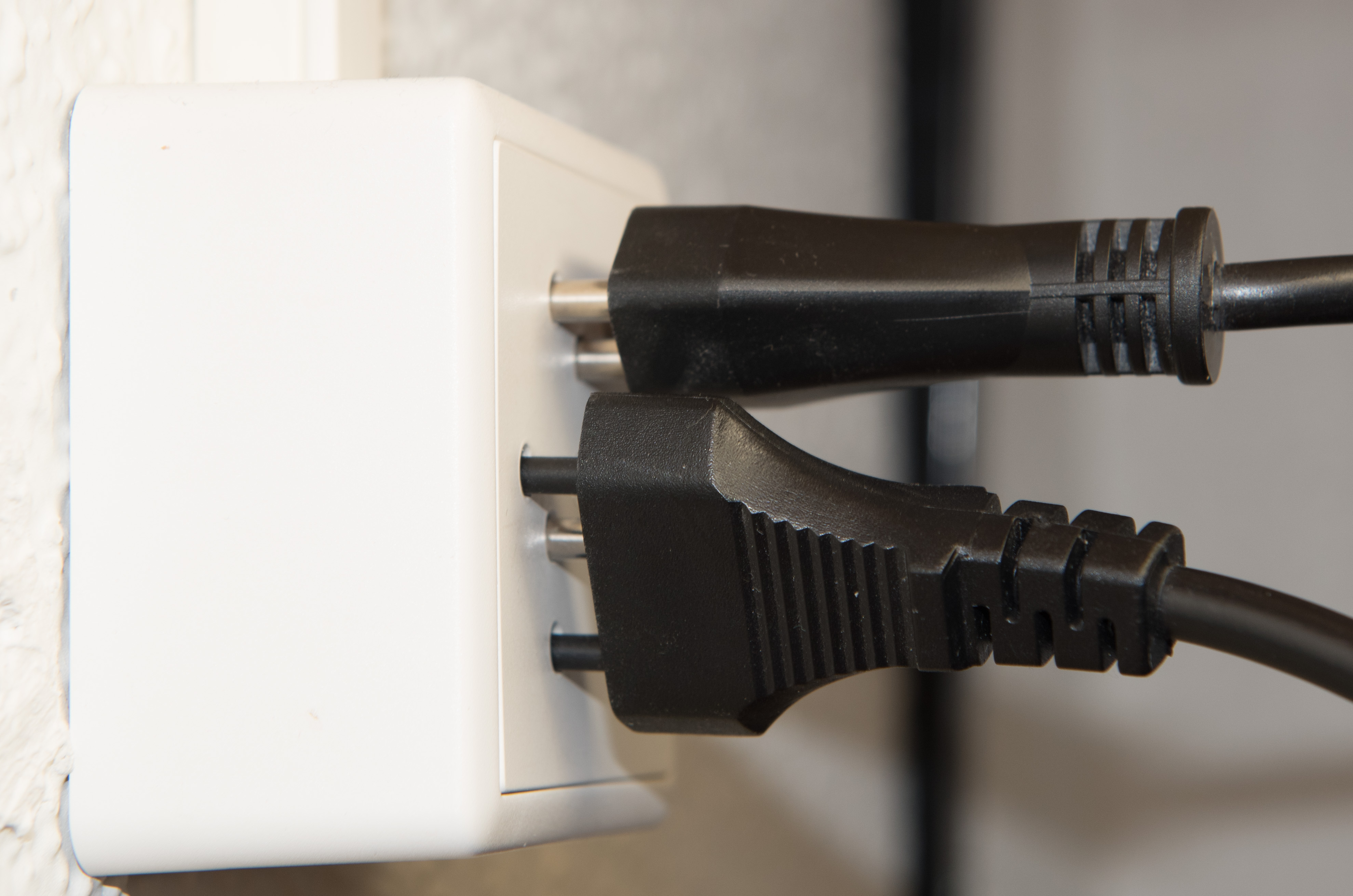 Vergleich von zwei Steckern gemäss SEV 1011 (Schweizer Norm, Stecker-Typ J), oben ein T12-Stecker nach der Norm SEV 1011:1998, unten ein T12-Stecker nach der Norm SEV 1011:2009. Stecker nach der älteren Norm (1998) dürfen seit 2013 nicht mehr produziert, ab 2016 nicht mehr verkauft werden. Die Neuinstallation von Steckdosen nach Typ T12 ist ab 2016 ebenfalls verboten. Es dürfen nur noch T13-Steckdosen, welche einen Schutzkragen haben, verwendet werden.